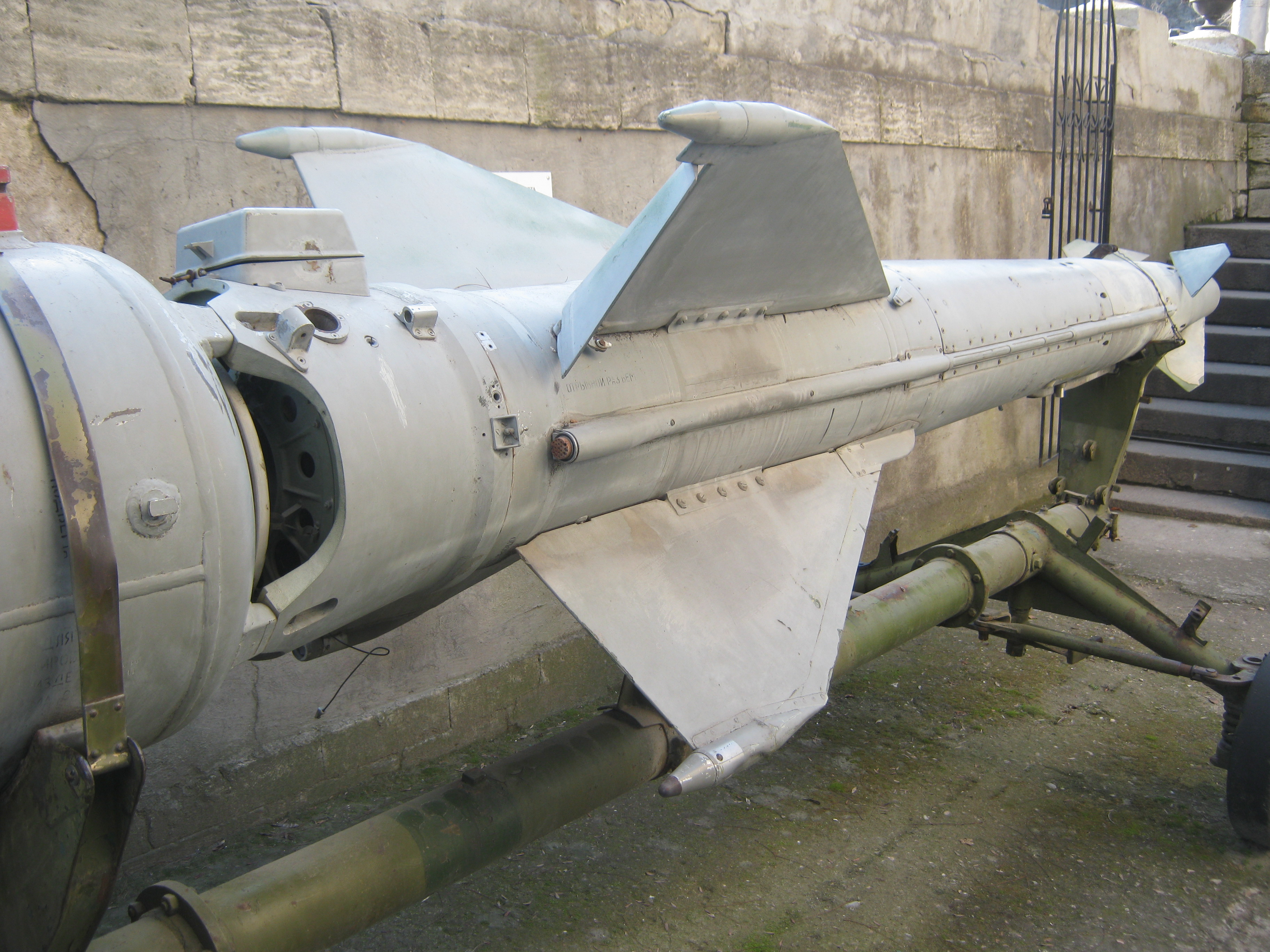 Ракета ЗРК Волна в экспозиции музея Черноморского флота в Севастополе